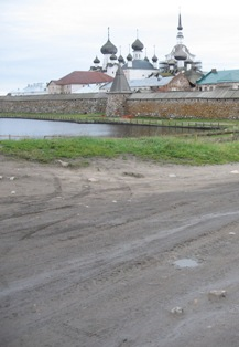 Улица Сивко. Большой Соловецкий остров.